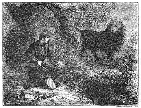 "Les chasses de l'Algérie"